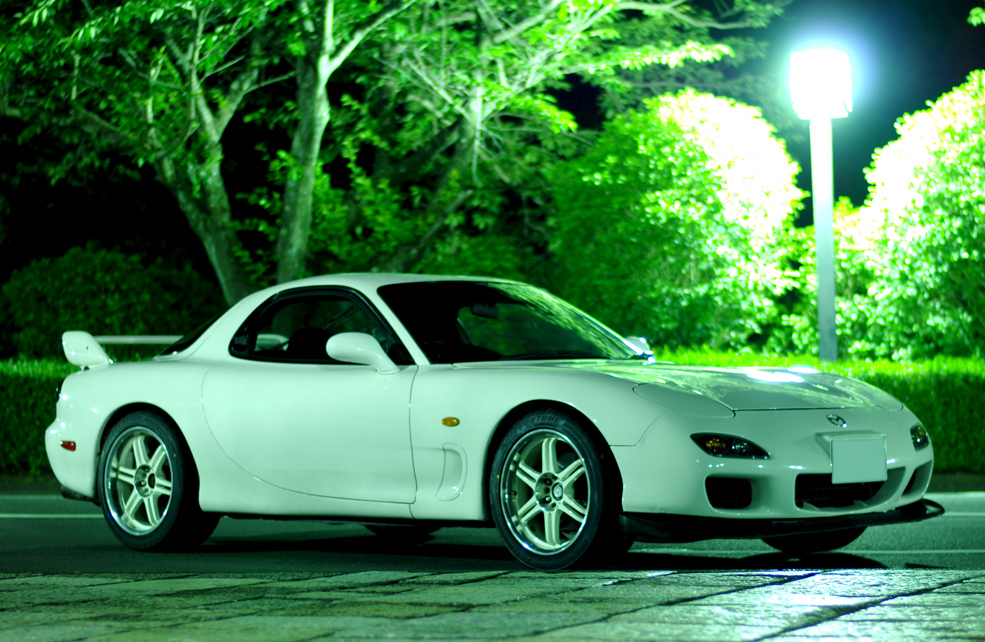 MAZDA RX-7 FD3S